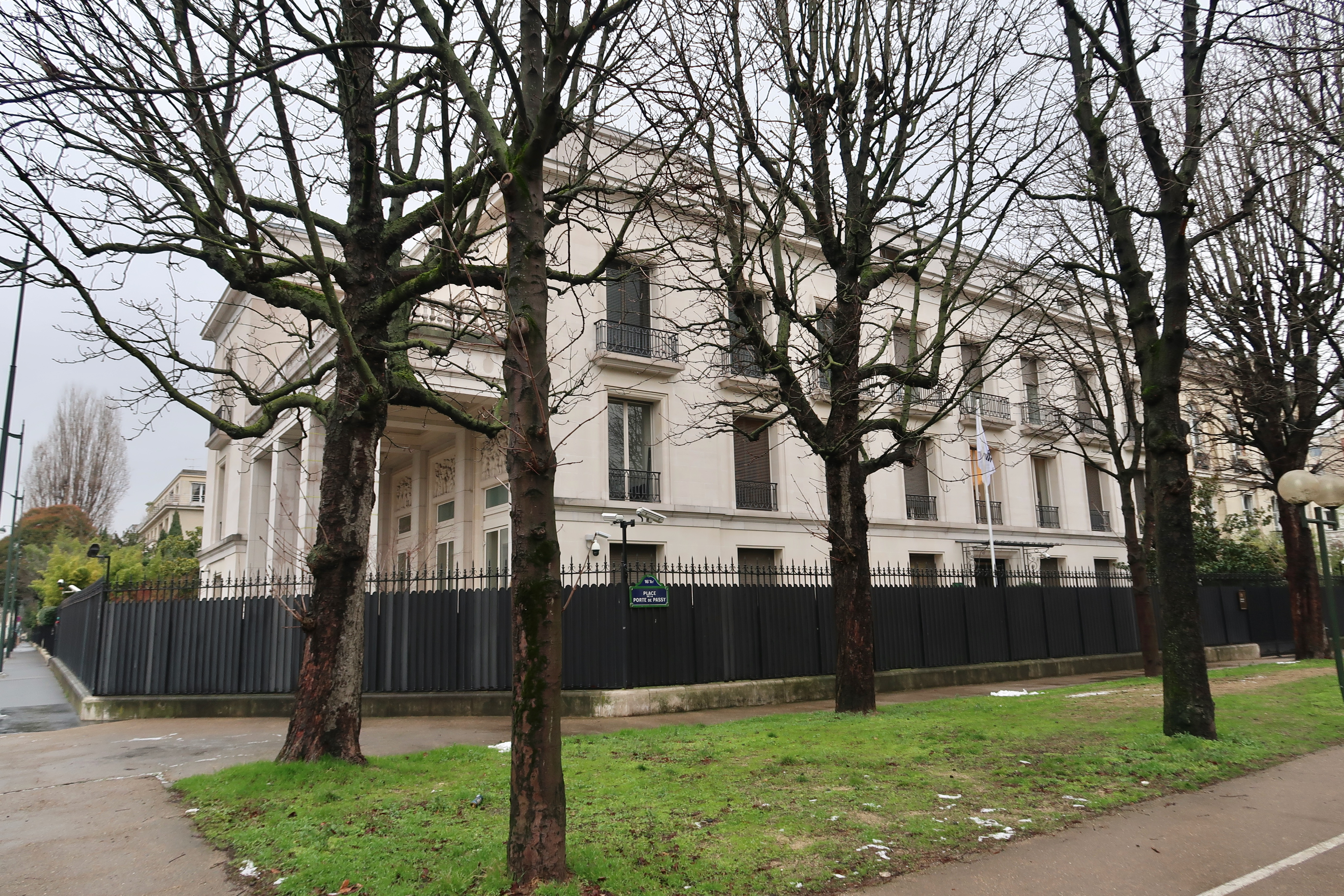 Délégation de la Corée du Sud après de l'OCDE, 4 place de la porte de Passy (Paris, 16e).